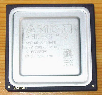 AMD K6-2 300 MHz - Front